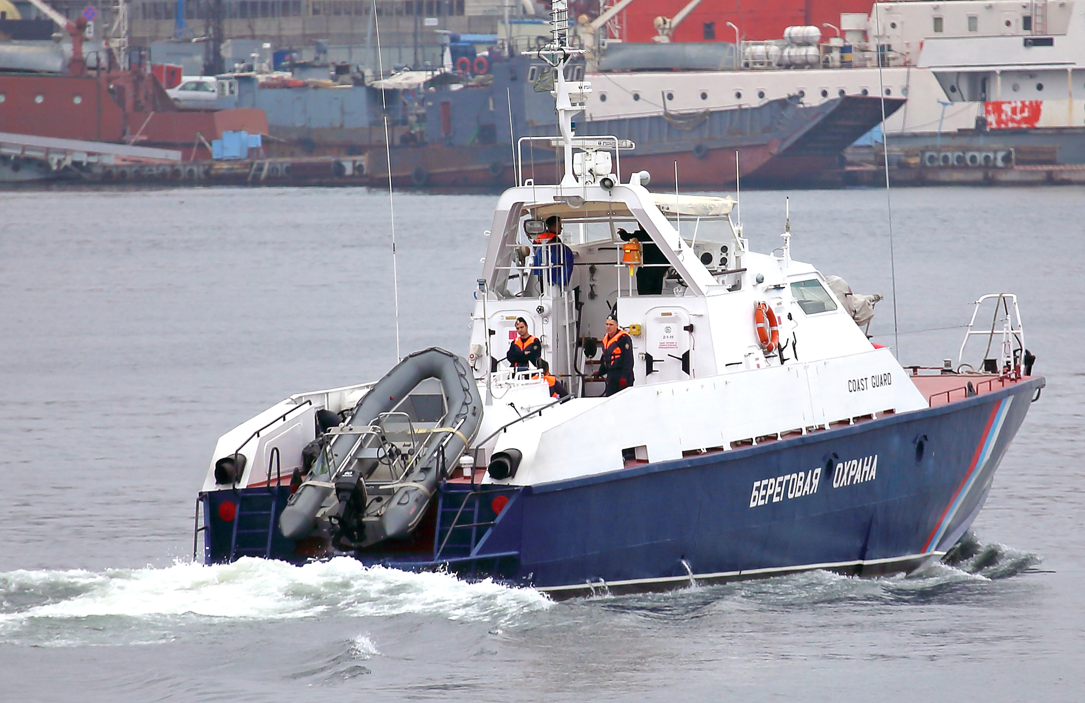 катер береговой охраны в золотом роге